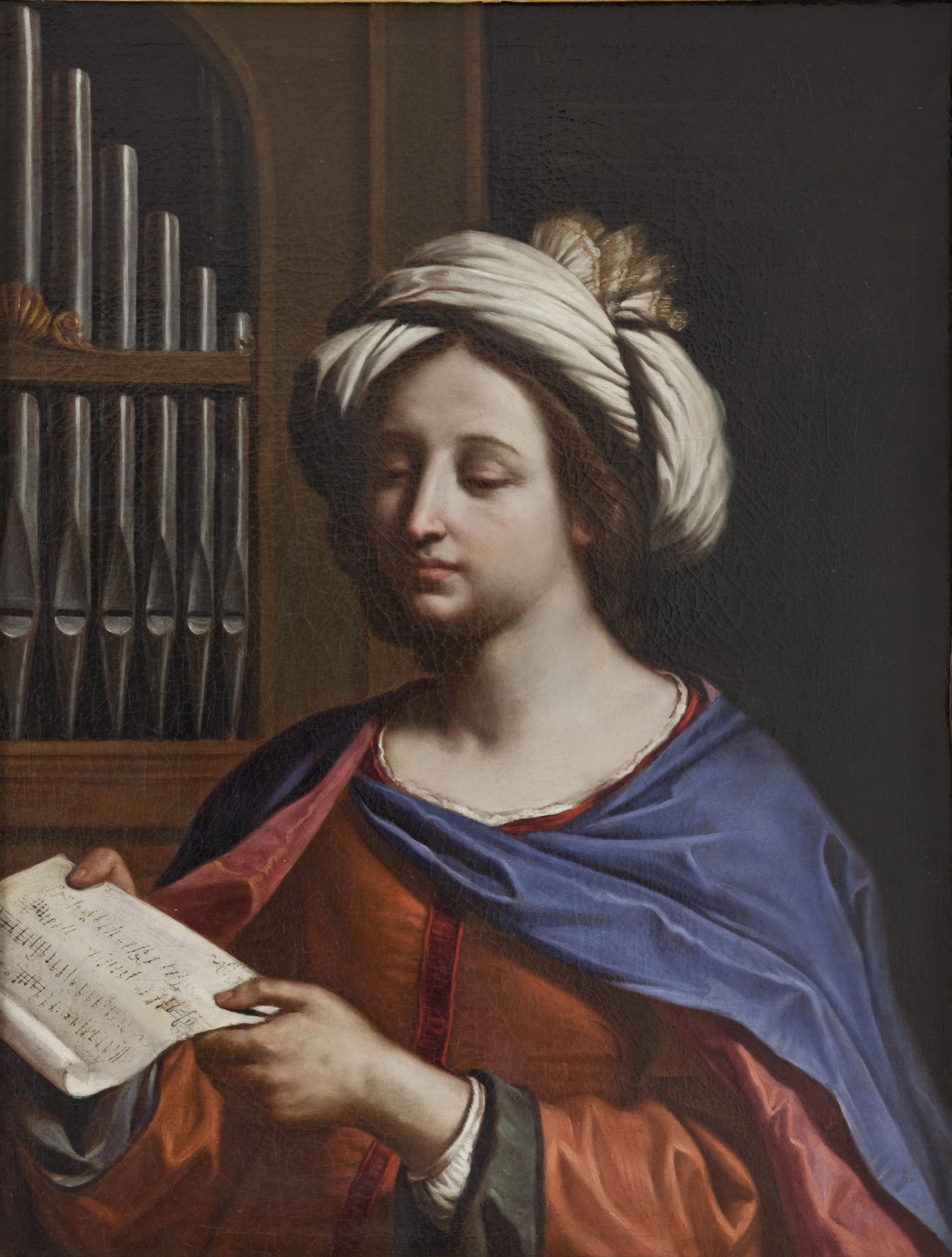 Santa Cecilia Olio su tela 89 x 67,5 cm